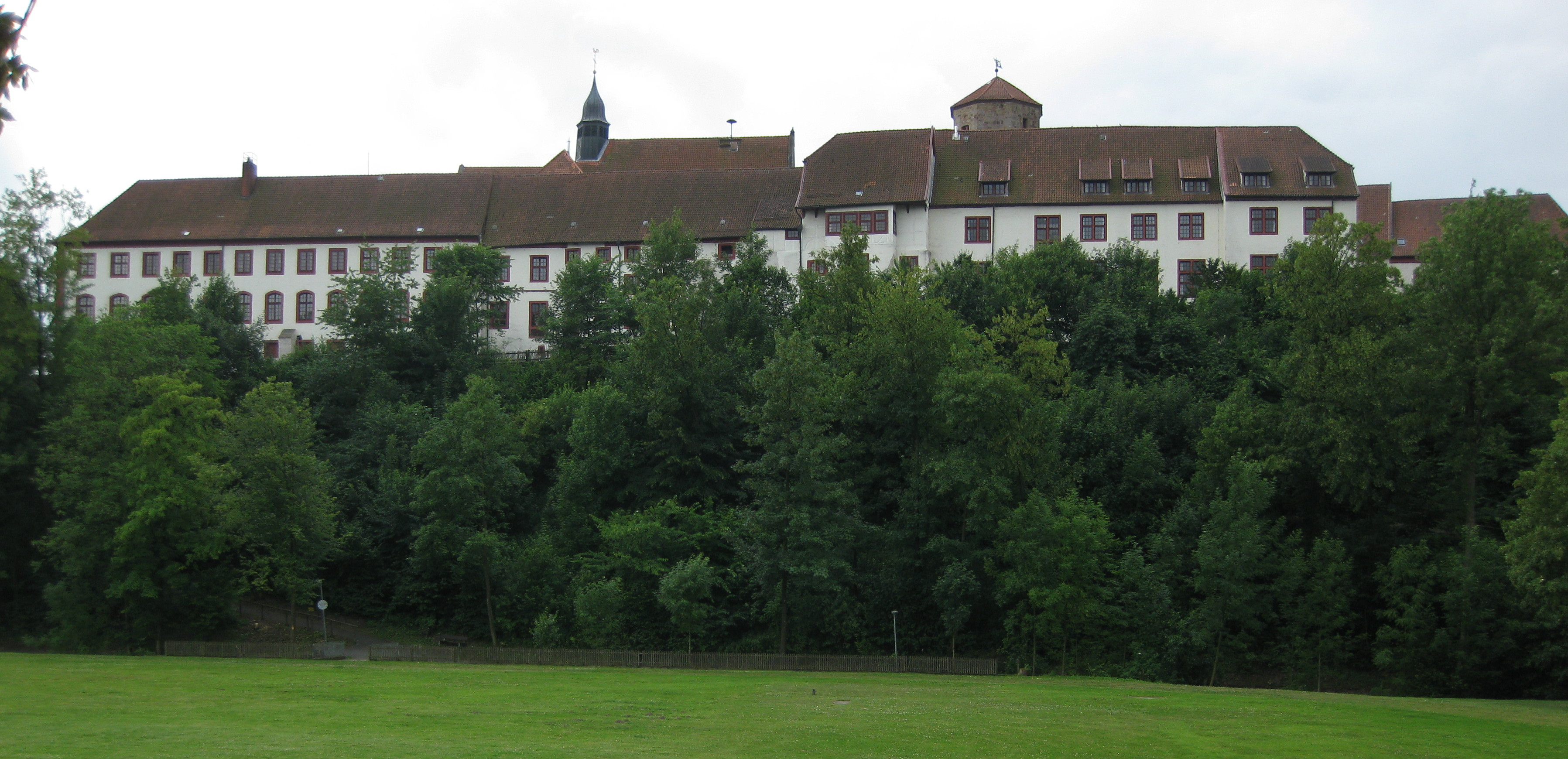 Schloss und Benediktinerabtei Iburg, Nordseite, aufgenommen vom Charlottenburger Ring